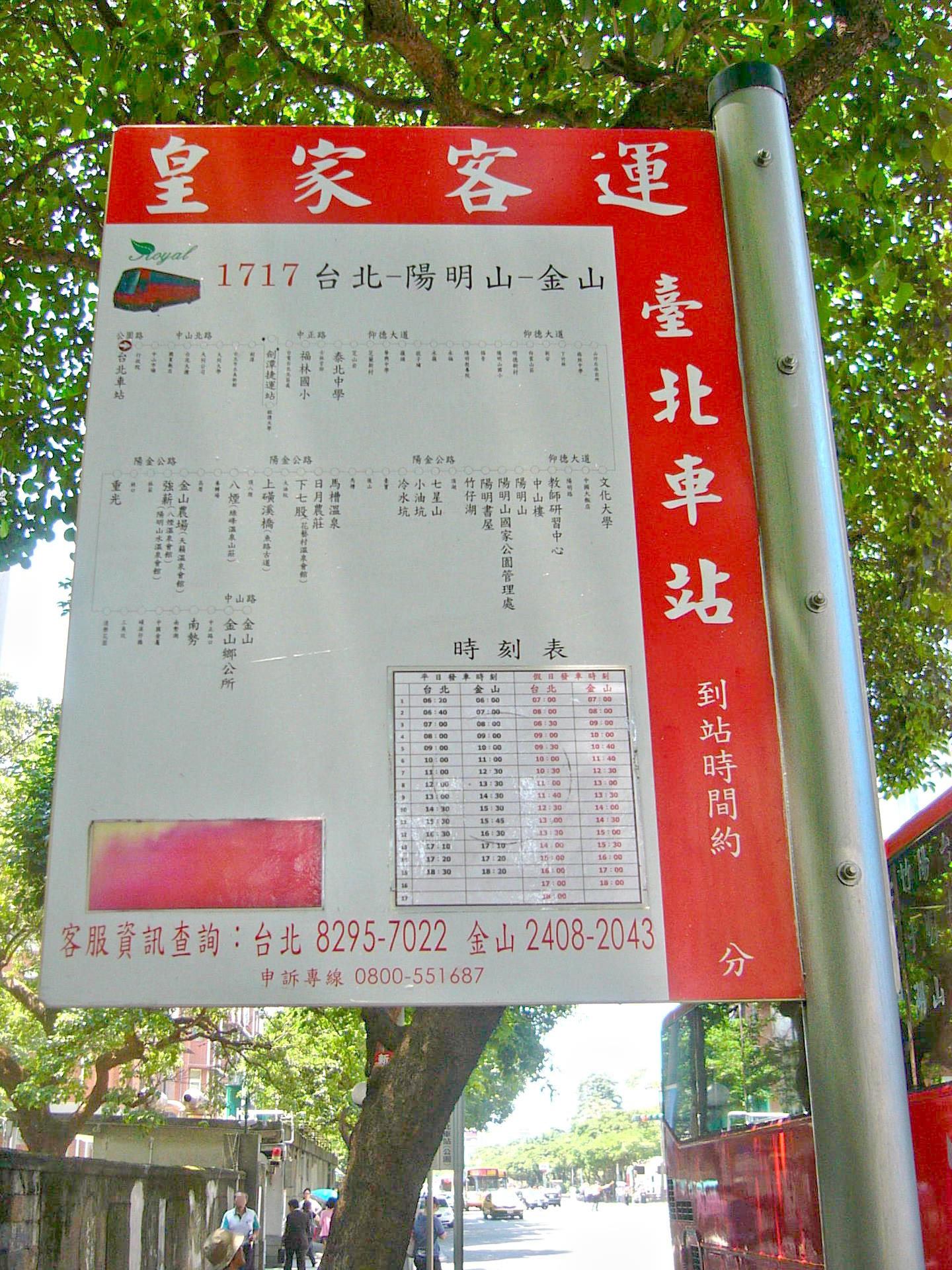 臺北市中正區公園路臺大醫院旁，皇家客運「臺北車站」站牌，現已拆除。